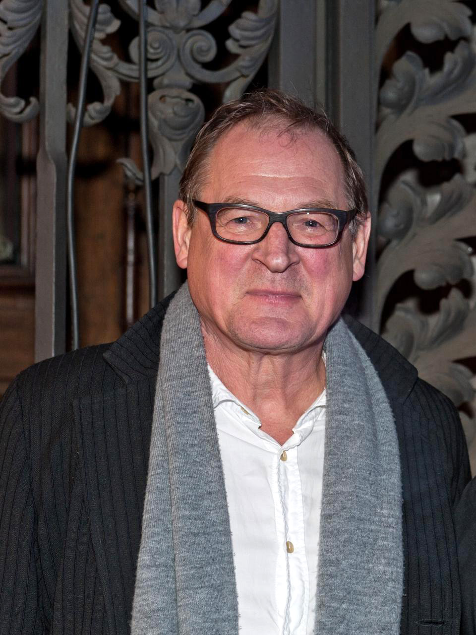 Burghart Klaußner, German actor, Berlinale 2012, ARD Degeto Blue Hour Party